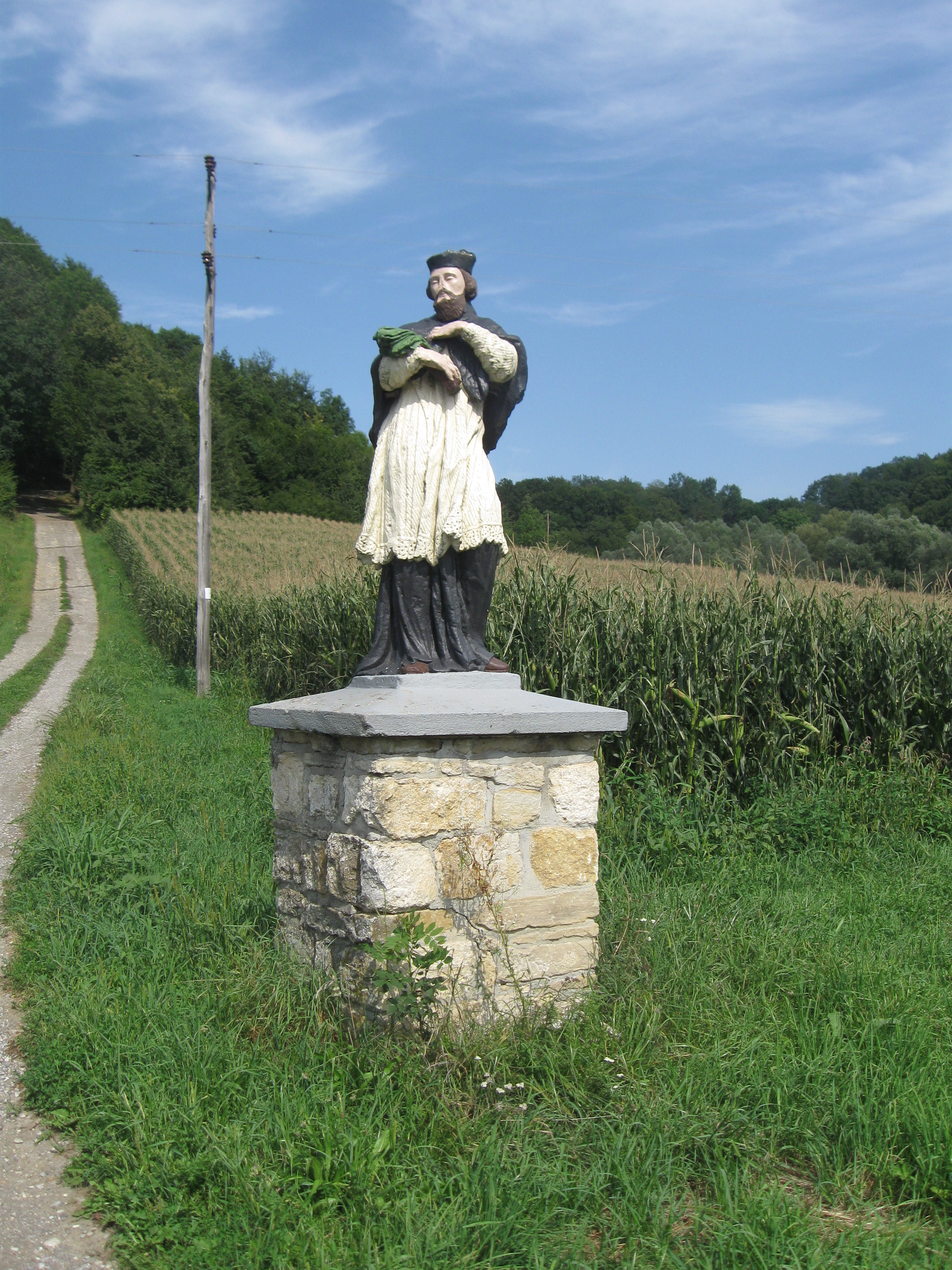 Na kamnitem podstavku stoji kip svetega Janeza Nepomuka, ki je bil postavljen v 19. stoletju. Kip stoji v bližini domačije Spodnji Jakobski Dol št. 36.